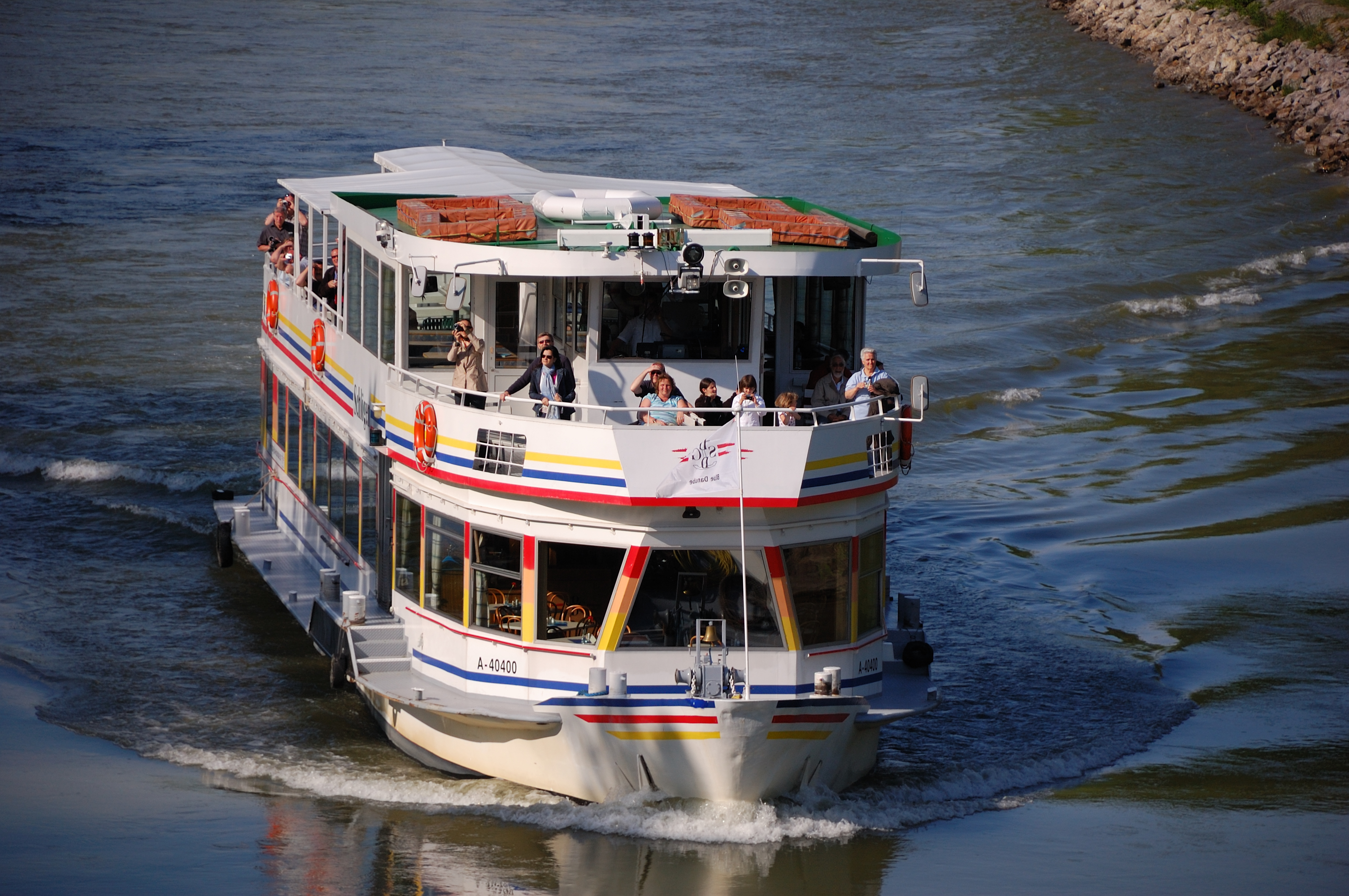 DSDG Blue Danube